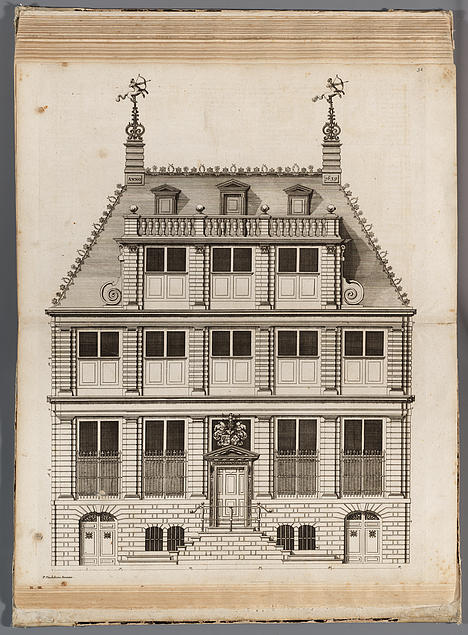 The mansion of Johan Huydecoper van Maarsseveen on Singel 548